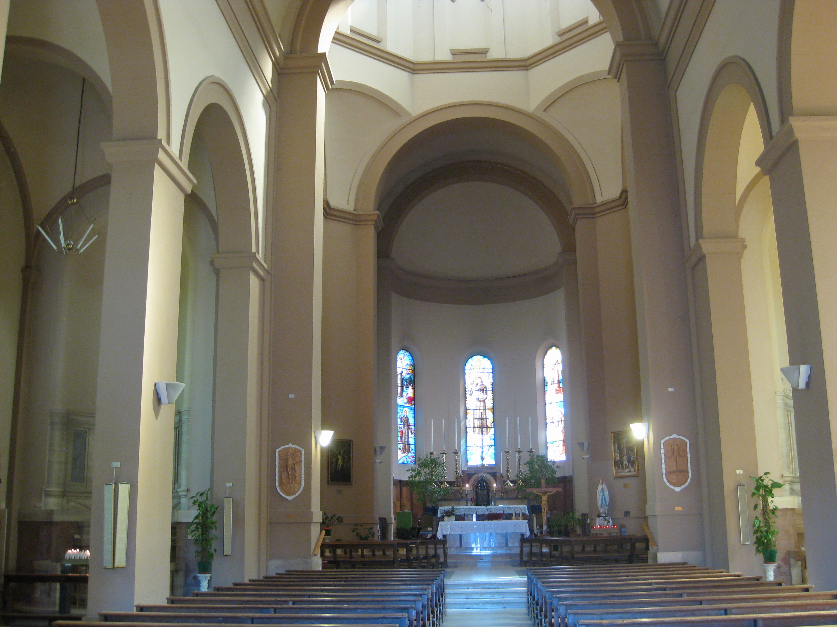 Foto propria, Chiesa di Sant'Antonio (Predappio), interno